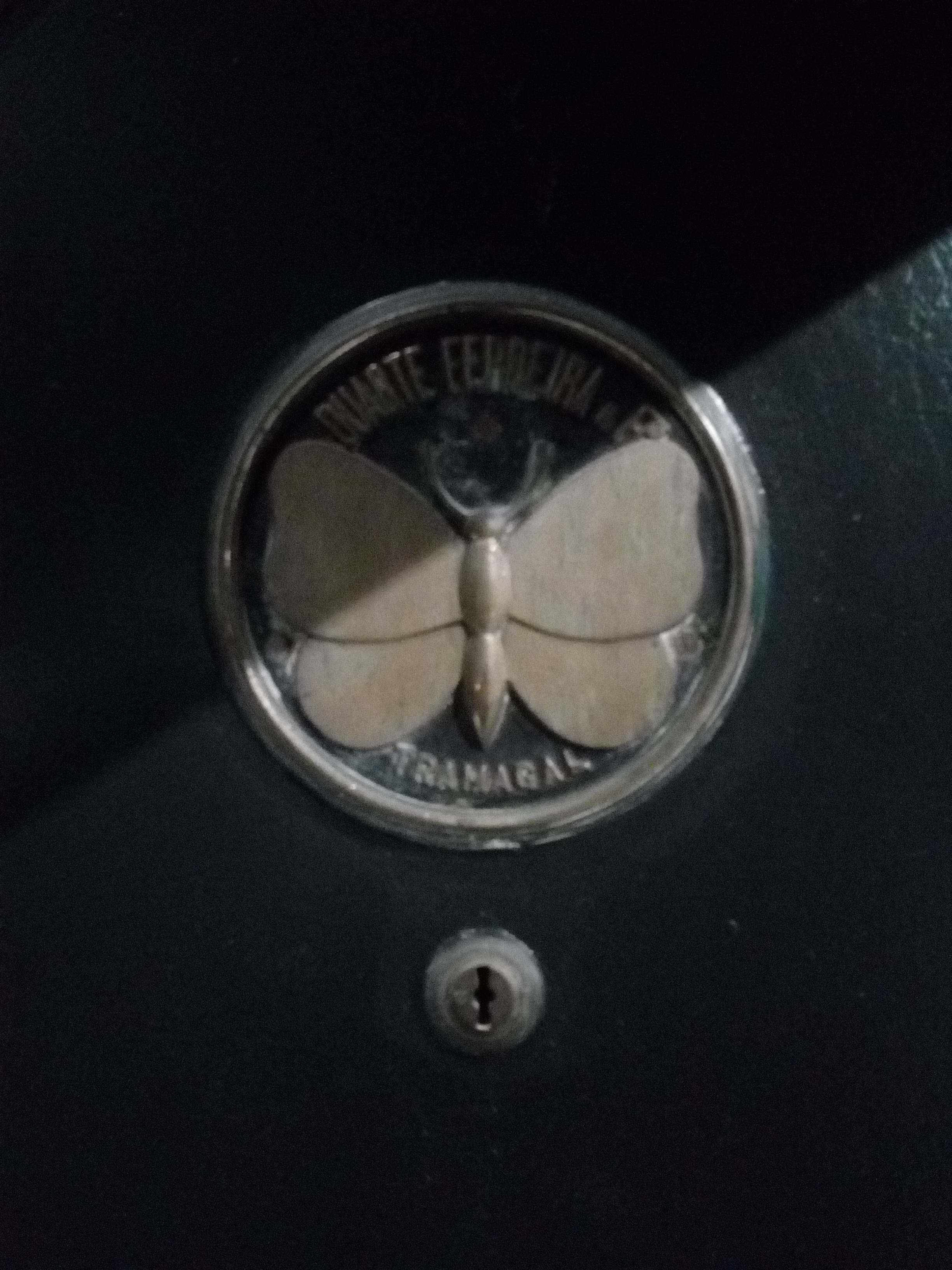 Símbolo da MDF, porta de cofre nos antigos escritórios em Tramagal (actual museu MDF)